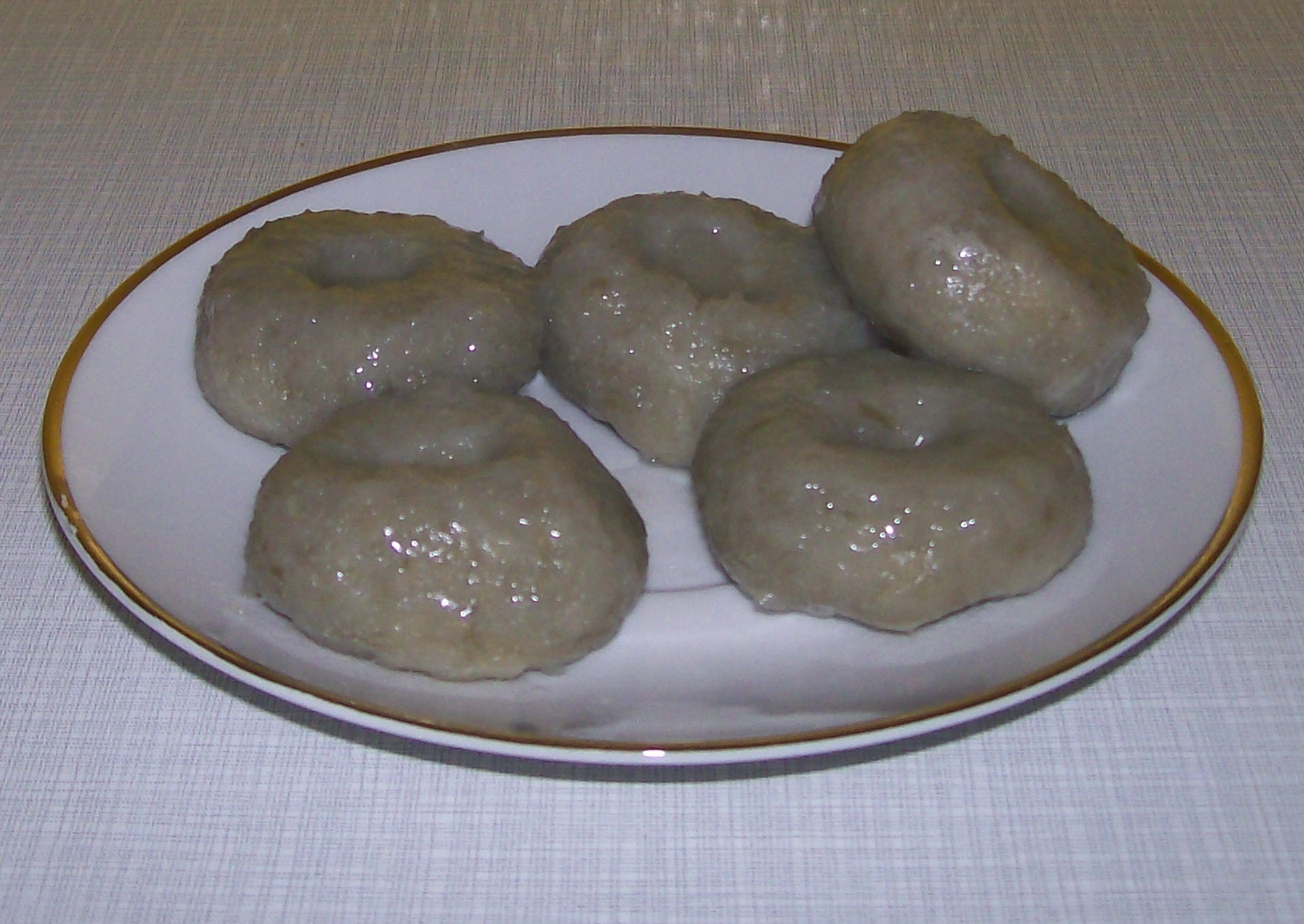 kluski czarne.